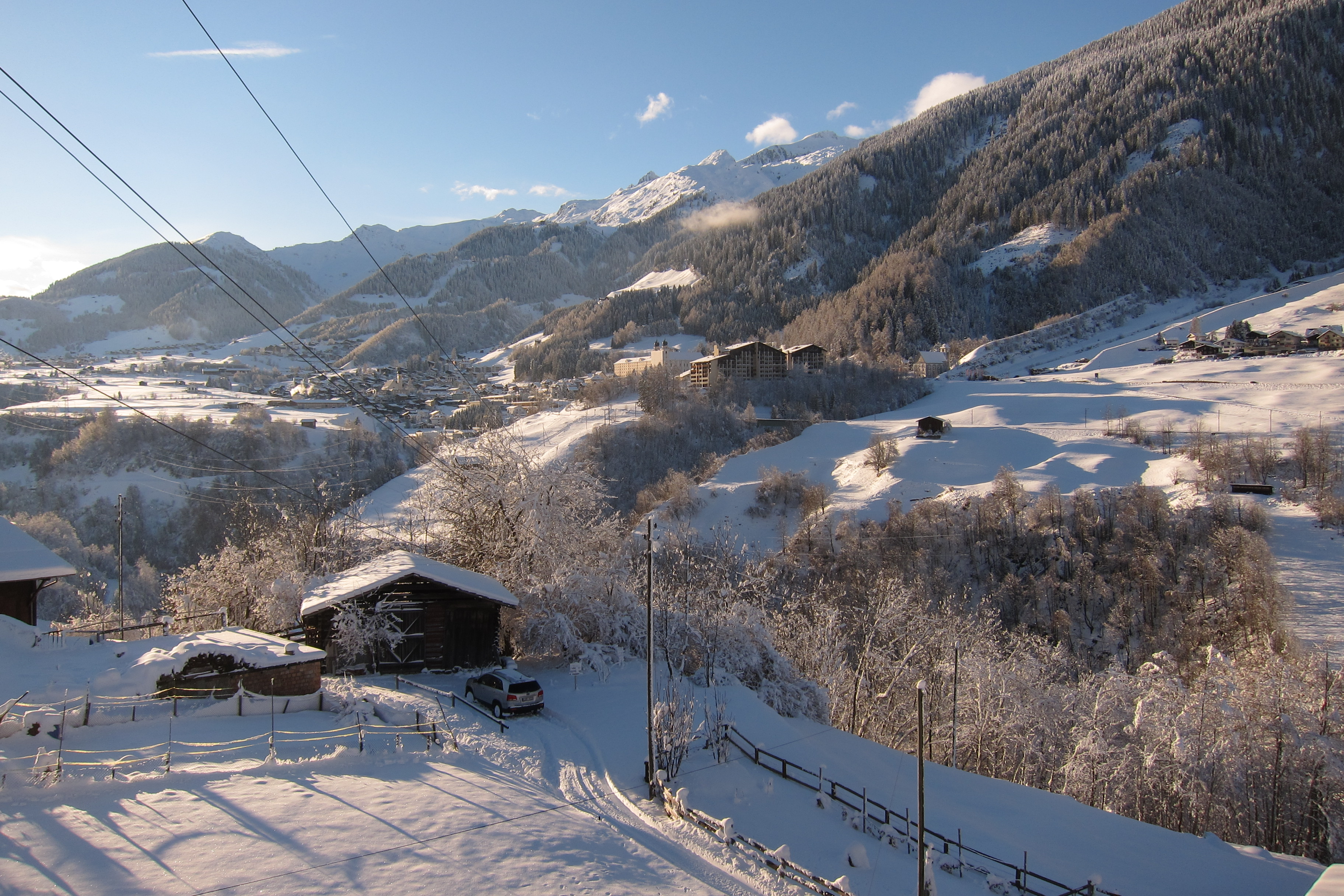 Blick in Richtung Disentis von Caprau